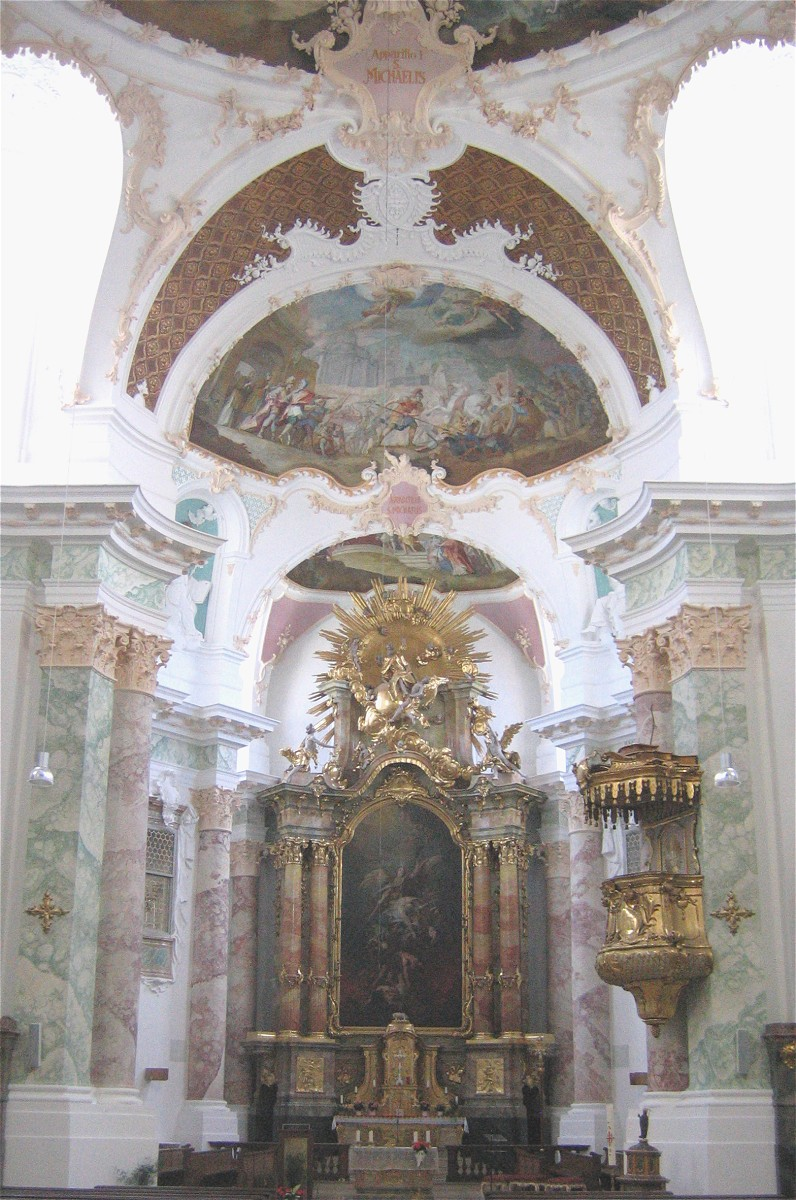 St. Michael Berg am Laim, München, Innenraum